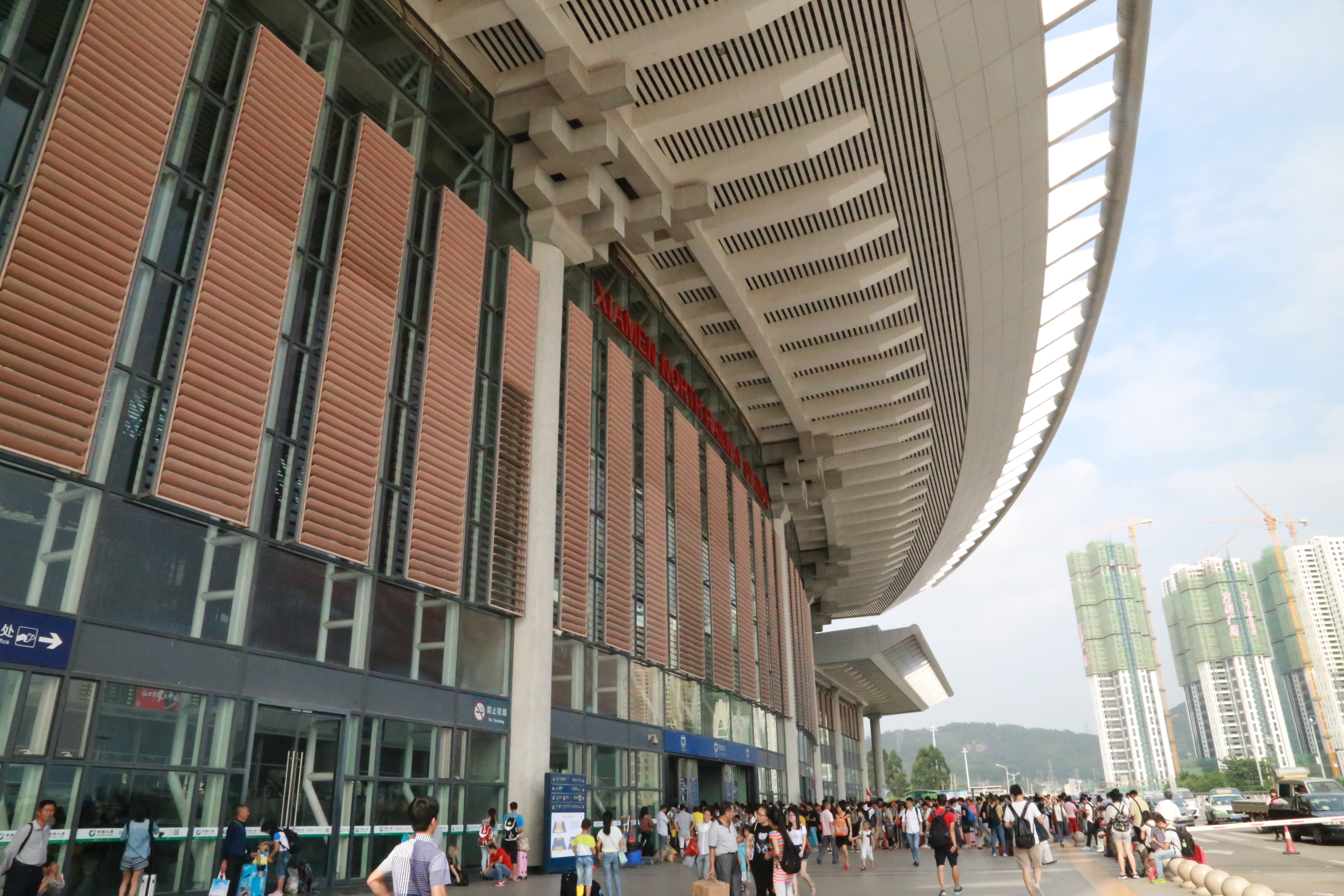 厦门北站出发层